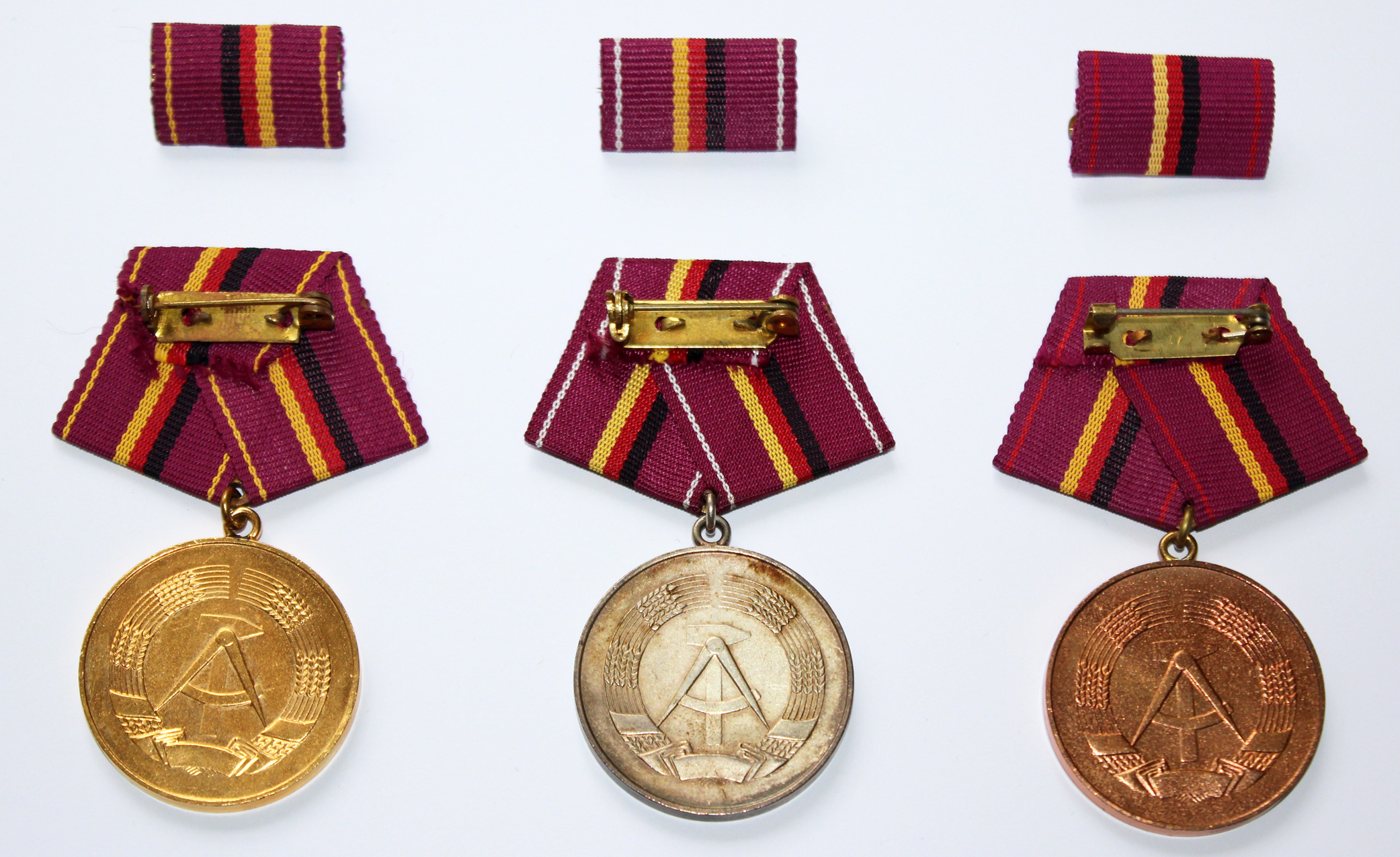 Verdienstmedaille der Zivilverteidigung der DDR in den Stufen Gold, Silber und Bronze, Rückseite